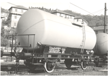 Kesselwagen aus den 60er-Jahren